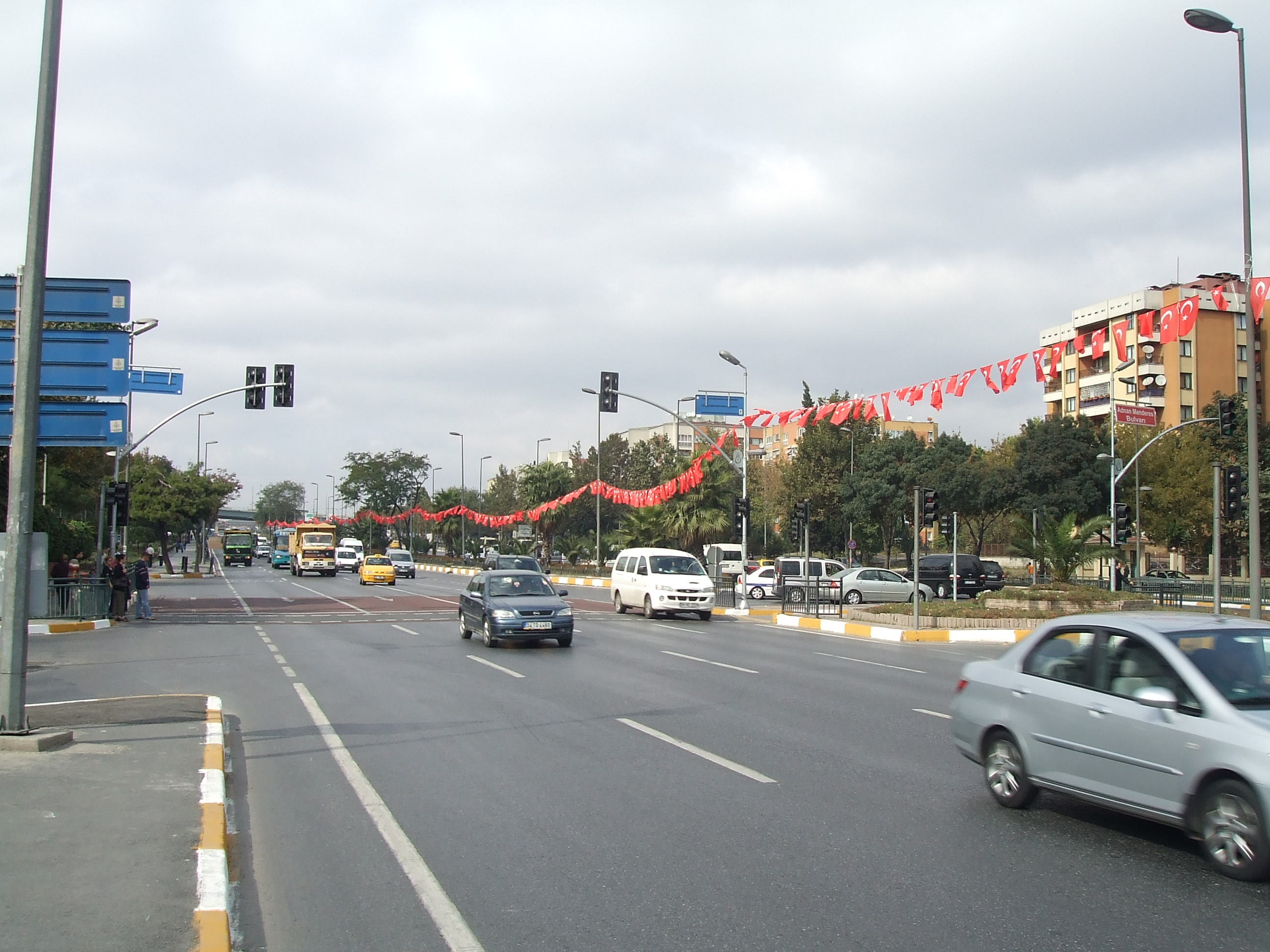 Vatan Caddesi, Fatih, İstanbul, Türkiye